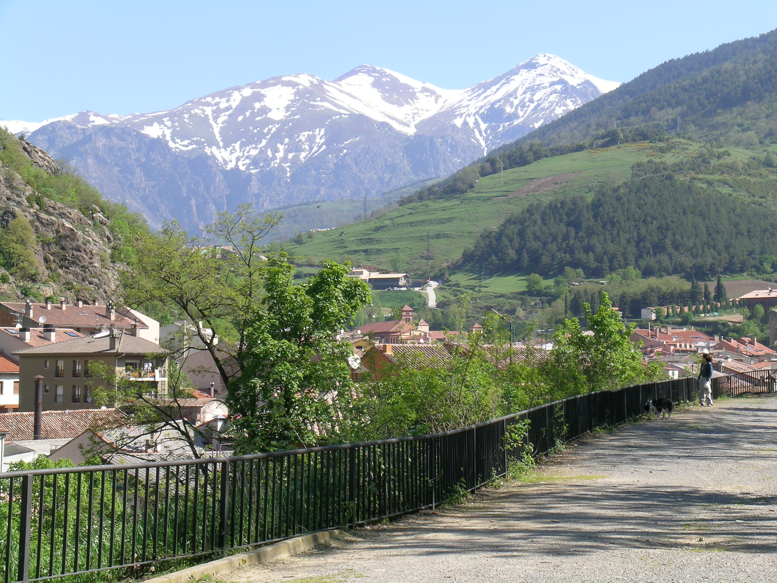 Cim de la Coma del Clot (2739 msnm)